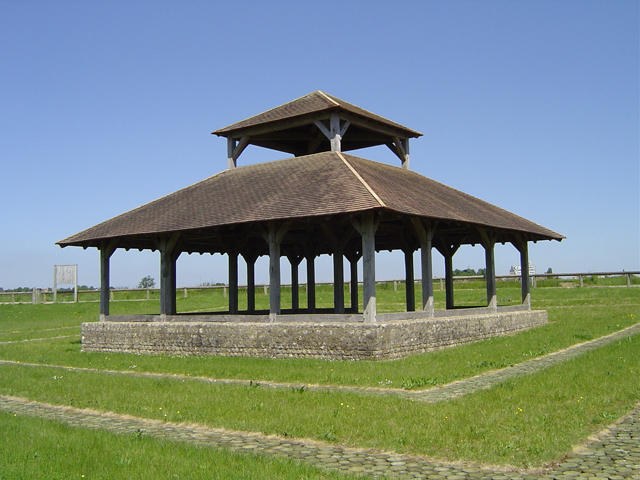 Fanum de Oisseau-Le-Petit © Matthieu Vallée 2004